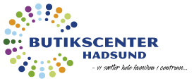 9560 Hadsund på Hornbechsvej. Hadsund butikscenters Logo